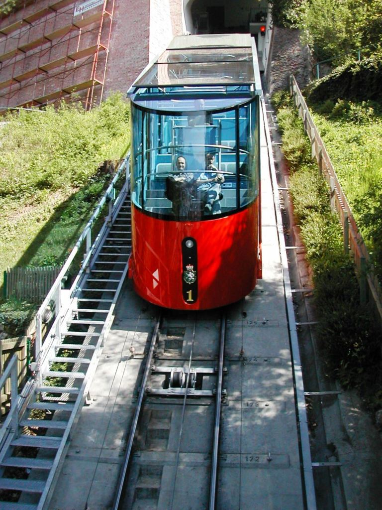 Grazer Schloßbergbahn: Wagen 1 fährt talwärts